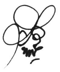 توقيع هيثم الشويلي